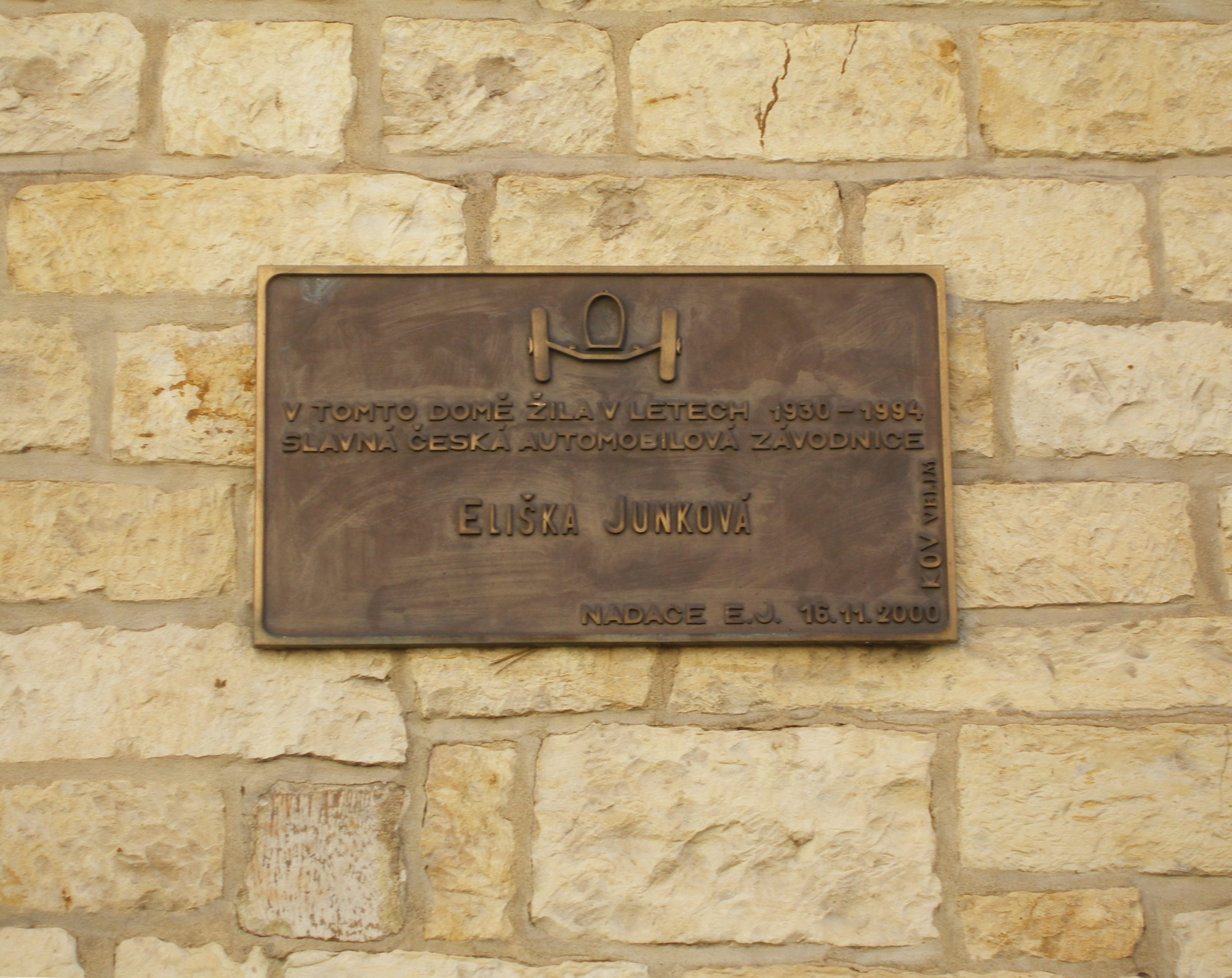 Pamětní cedule na domě, kde žila Eliška Junková (Praha, Úvoz 156/13).